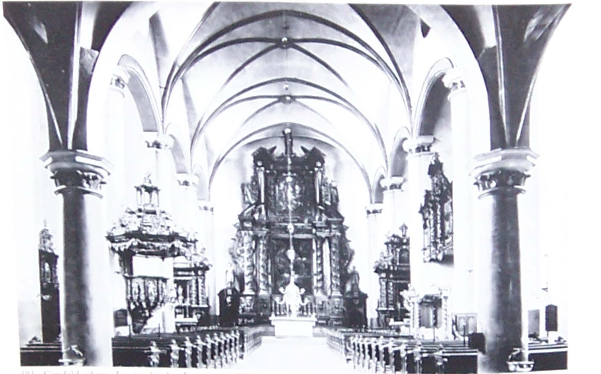 Innenansicht der Jesuitenkirche Coesfeld von 1898. Aus: Die Baudenkmäler in Westfalen - Kriegsschäden und Wiederaufbau von Karl E. Mummenhoff. Fr. Wilh. Ruhfus Verlagsbuchhandlung Dortmund 1968. Seite 344 Abbildung Nr. 381 Bildunterschrift: "Coesfeld, ehem. Jesuitenkirche, Innenraum 1898".